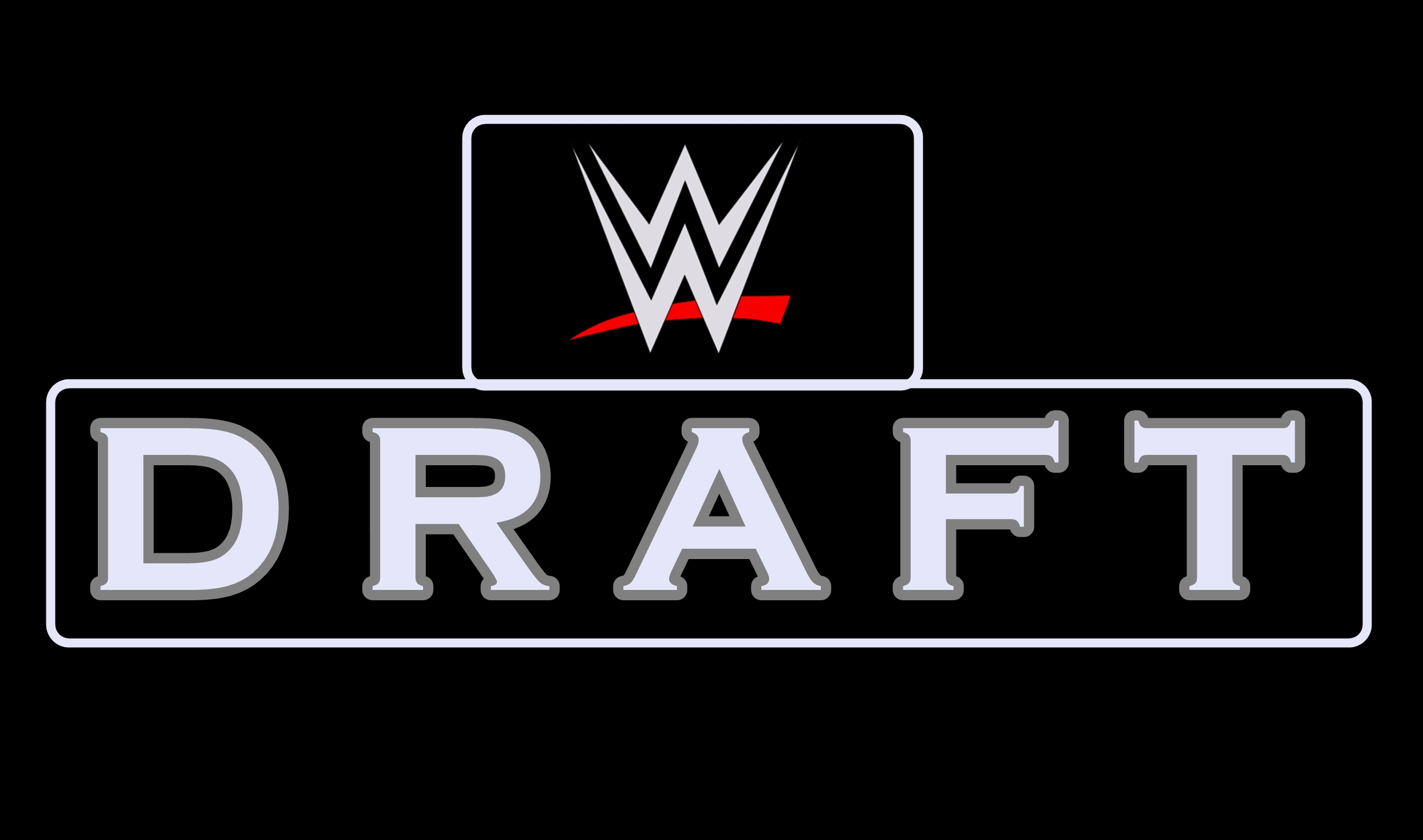 Imagen creada con PhotoScape, usando barras especiales y letras Copperplate Ghotic de un color gris y plomo.Se utilizó el logo del archivo .